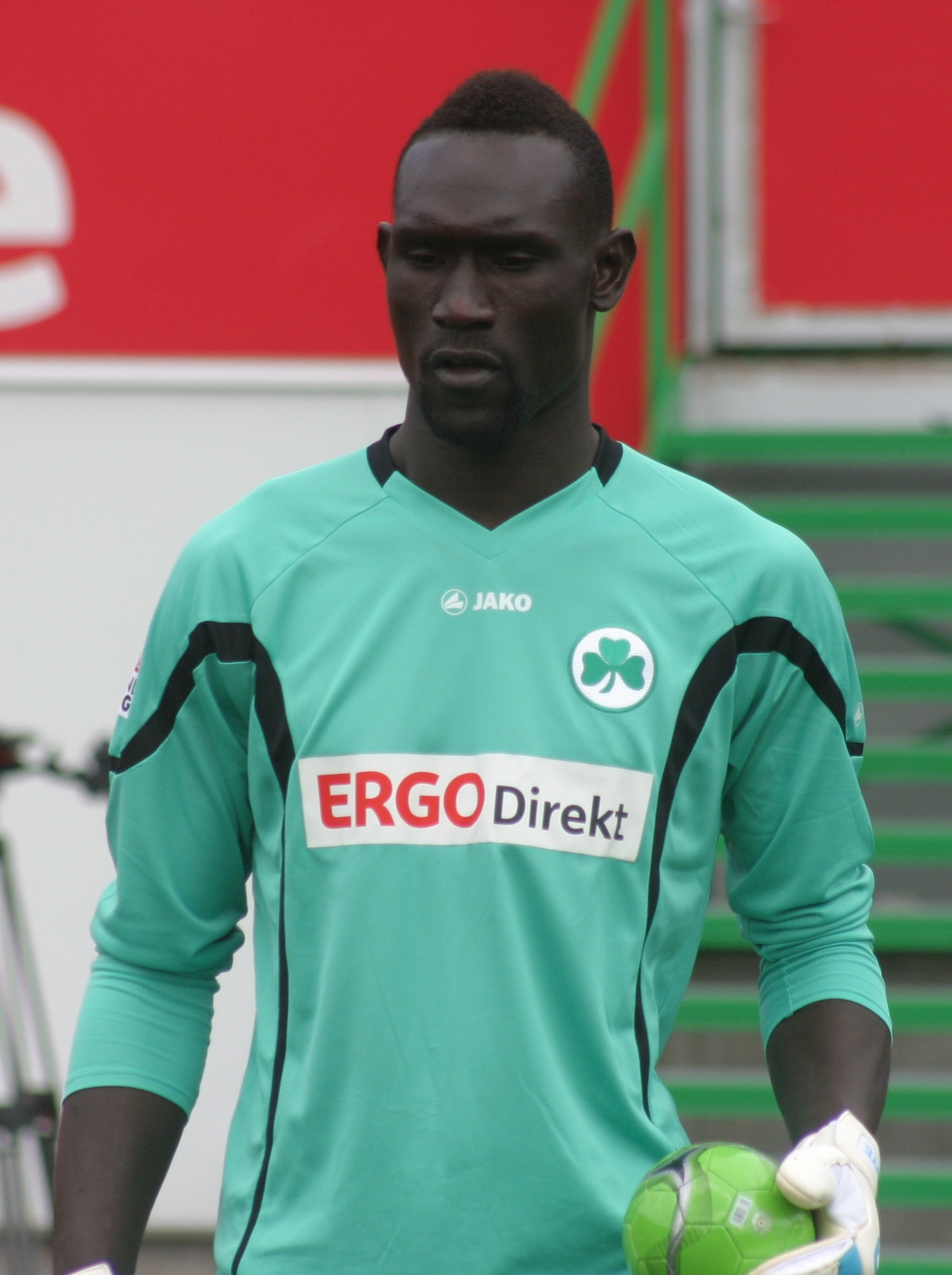 Issa Ndoye